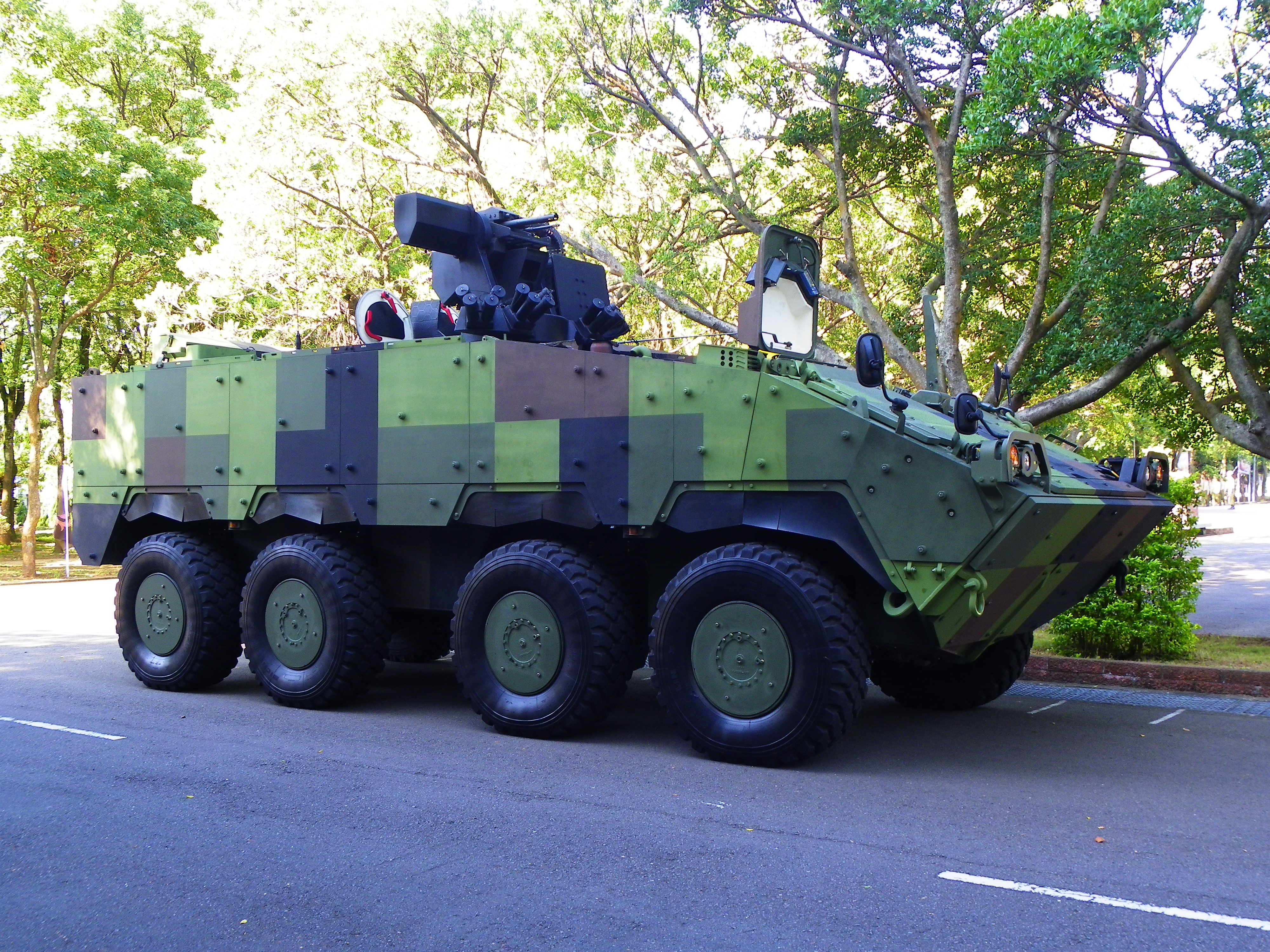 中文（台灣）: 2012年憲兵學校龜山校區營區開放活動，車輛分列式開始前停放操場附近的雲豹甲車。